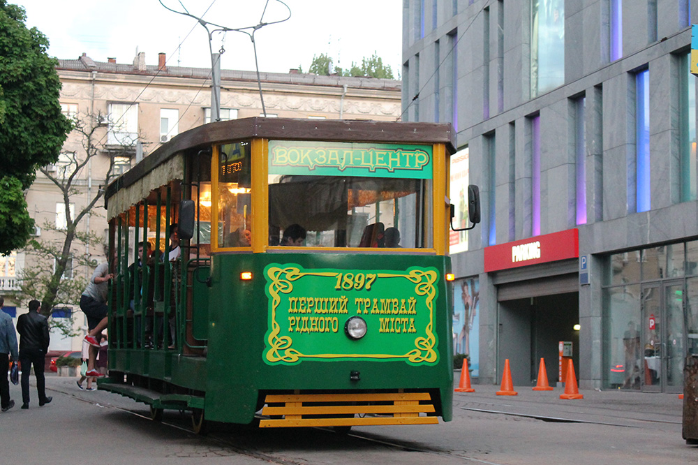 Ретро-трамвай у Дніпрі, квітень 2016.